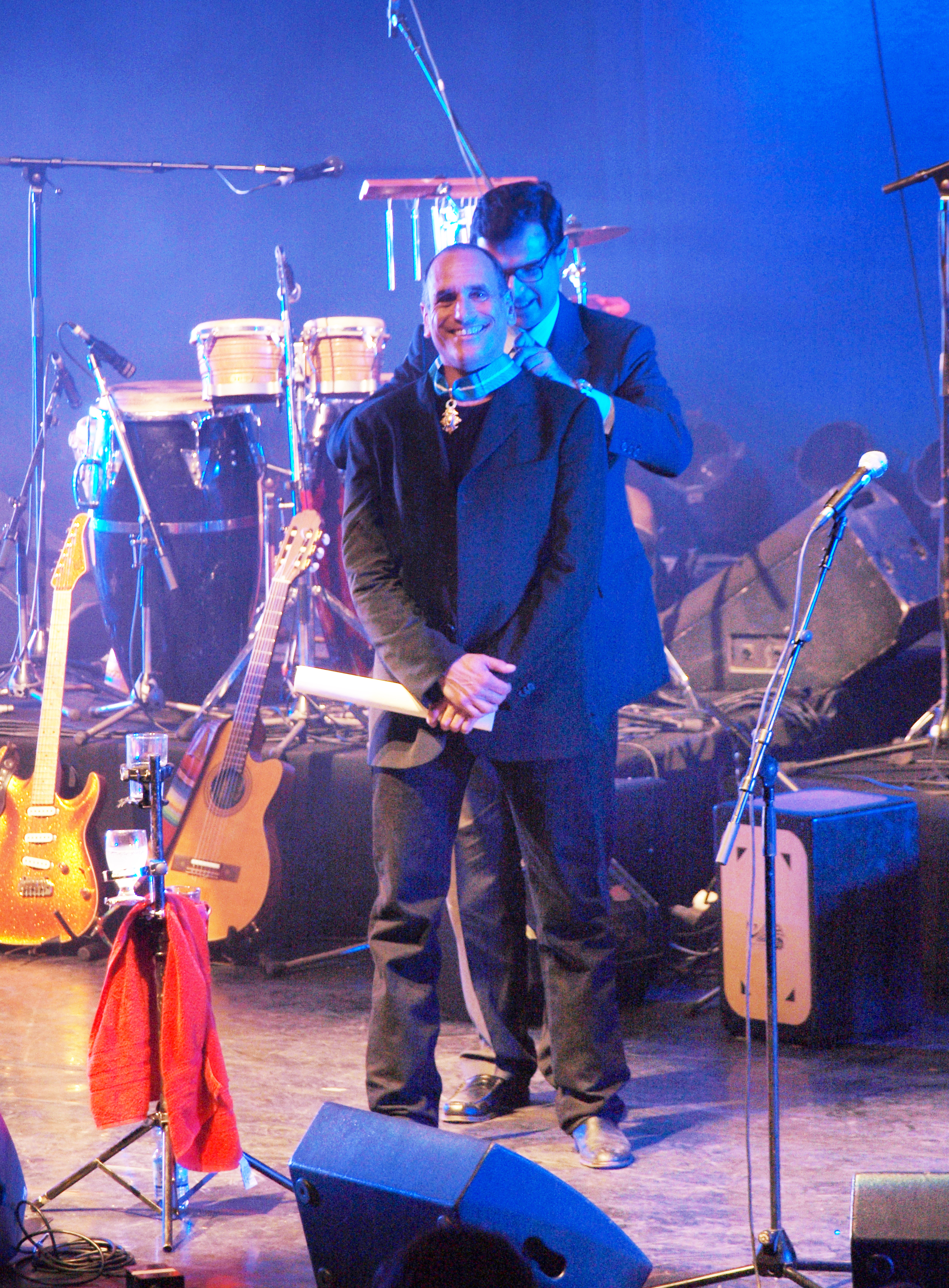 David Broza, Tel Aviv